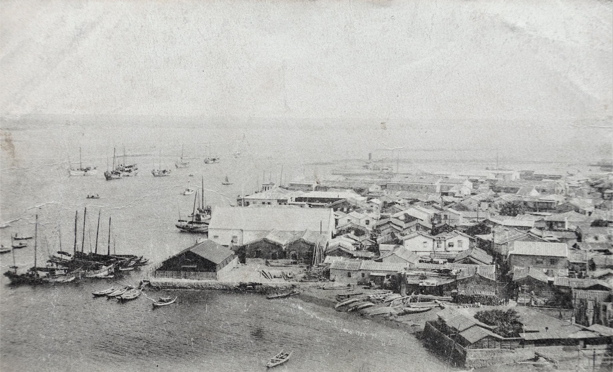 中文（台灣）: 打狗港（後改稱高雄港）。